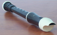 A baroque recorder